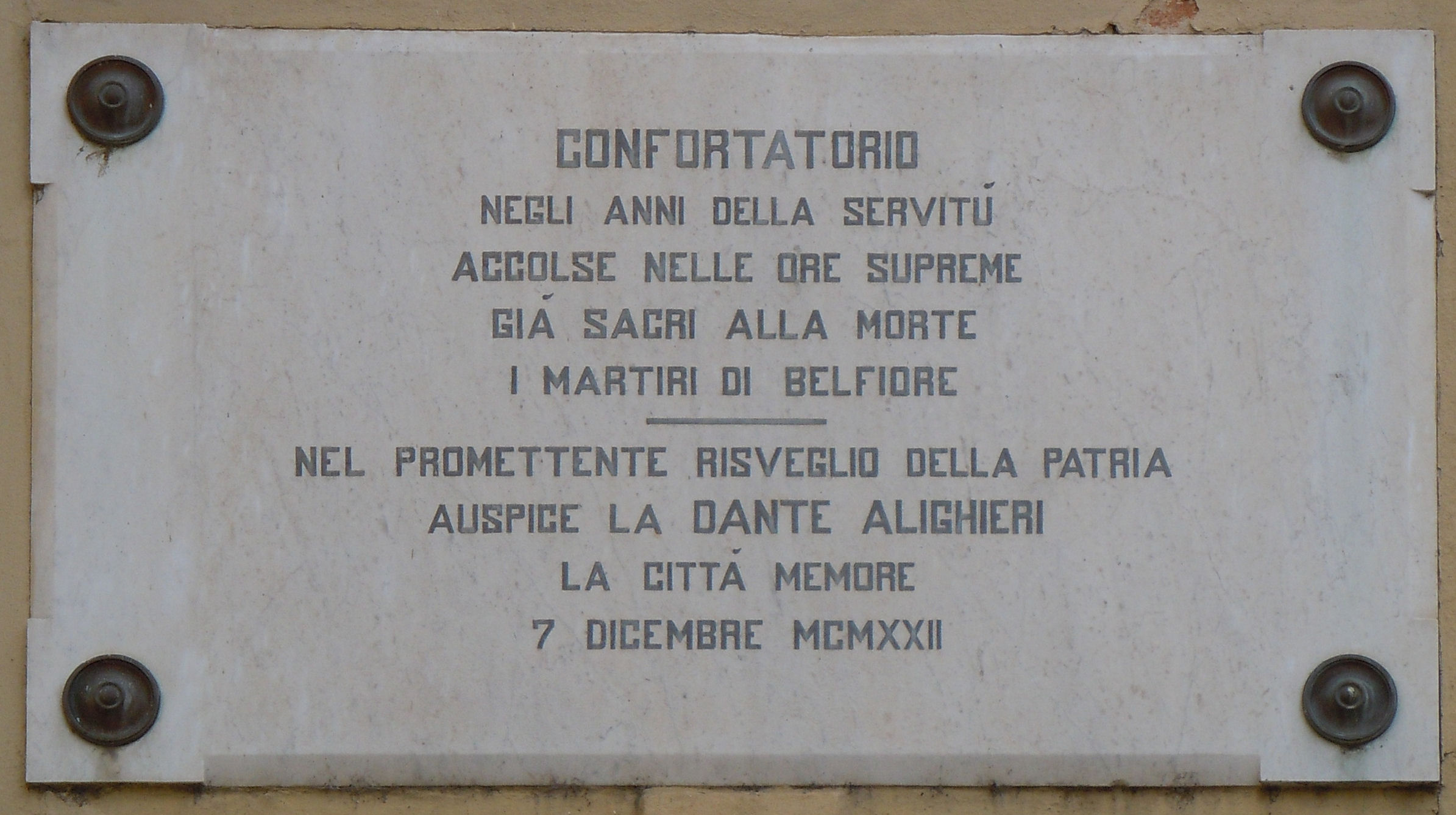 Mantova, lapide ai Martiri di Belfiore posta in Via Acerbi.